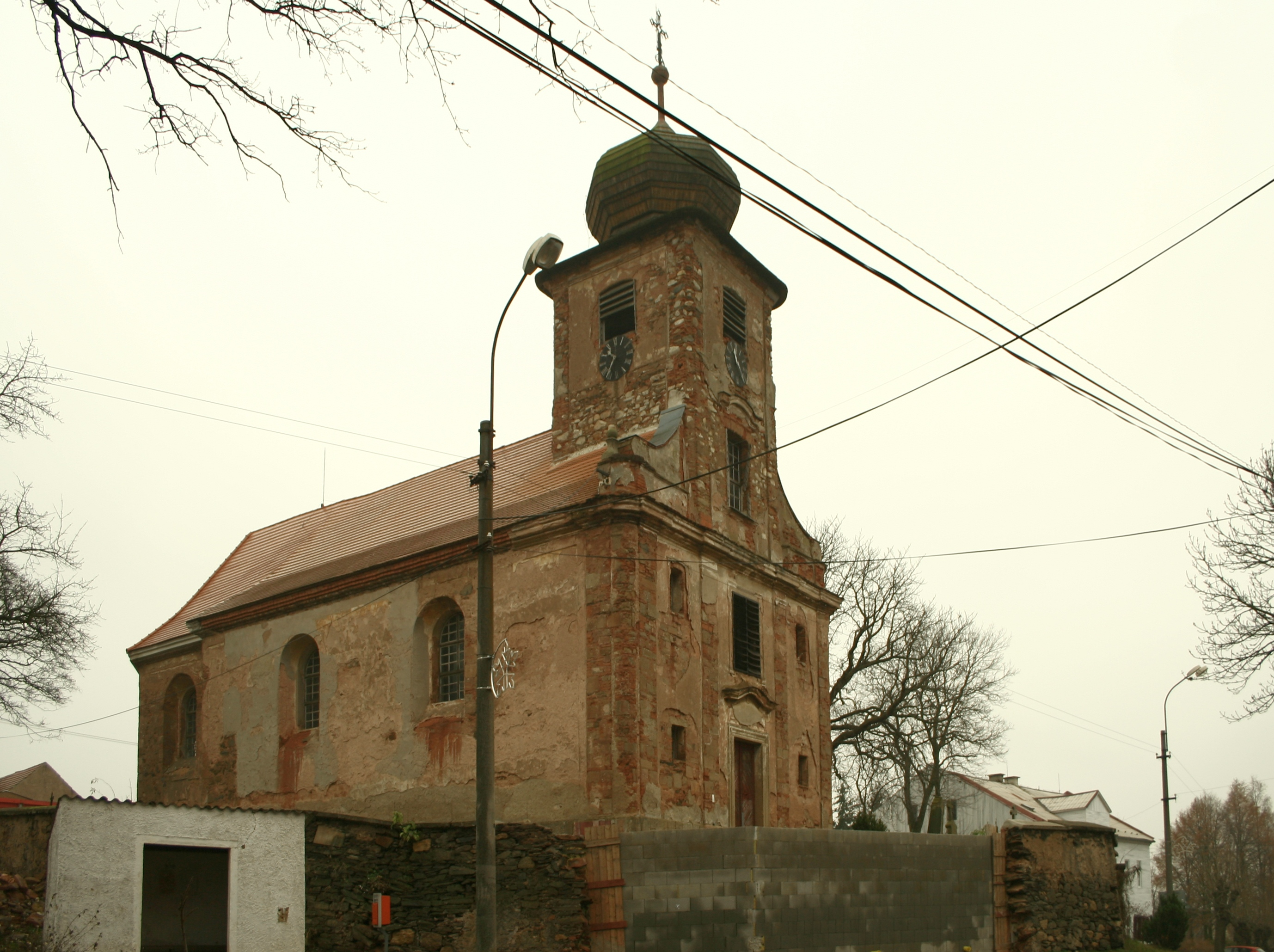 Kostel sv. Jakuba Většího (Močidlec)